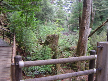 屋久杉ランドにて